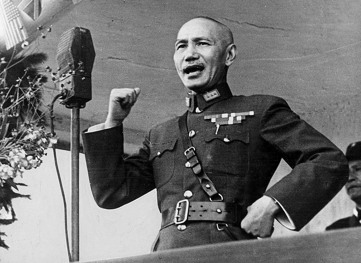 中文（台灣）: 蔣介石發表廬山聲明